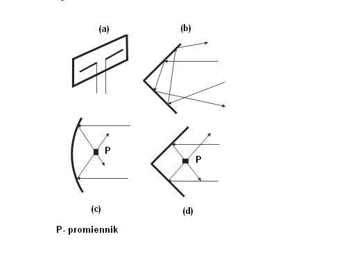 Rodzaje reflektorów